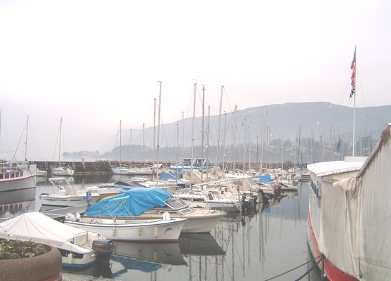 Le port de la ville d'Aix-les-Bains en France dans le département de la Savoie.